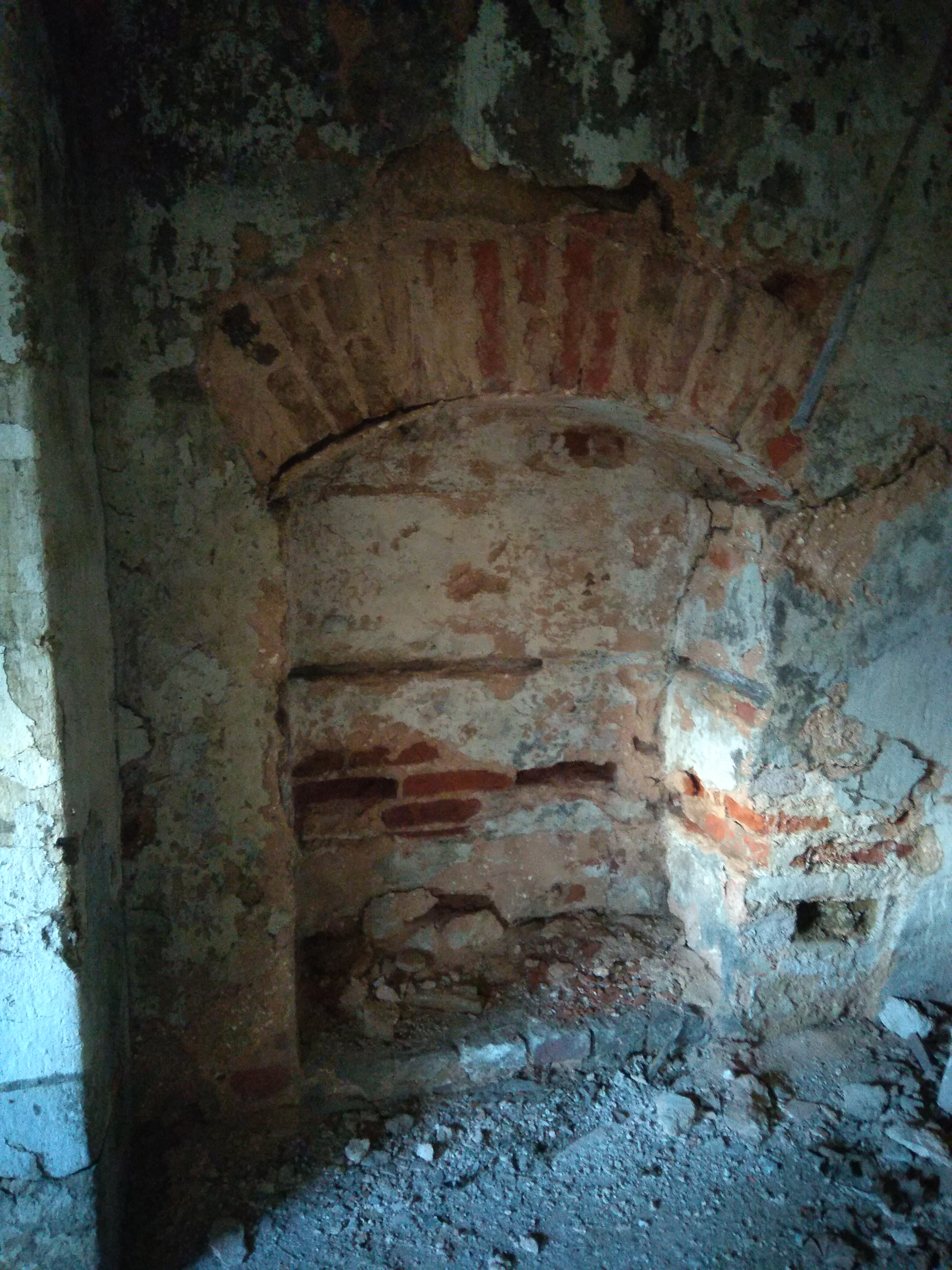 Linnuseala põhjavallil seisva majandus-abihoone kelder. Vaade hoone idaotsa nišiga keldriseinale, mille taga asuvad vana puidust mõisahäärberi keldriruumid.